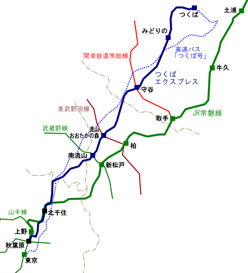 東京都心 - 茨城県南部間の鉄道・バス各路線経路図